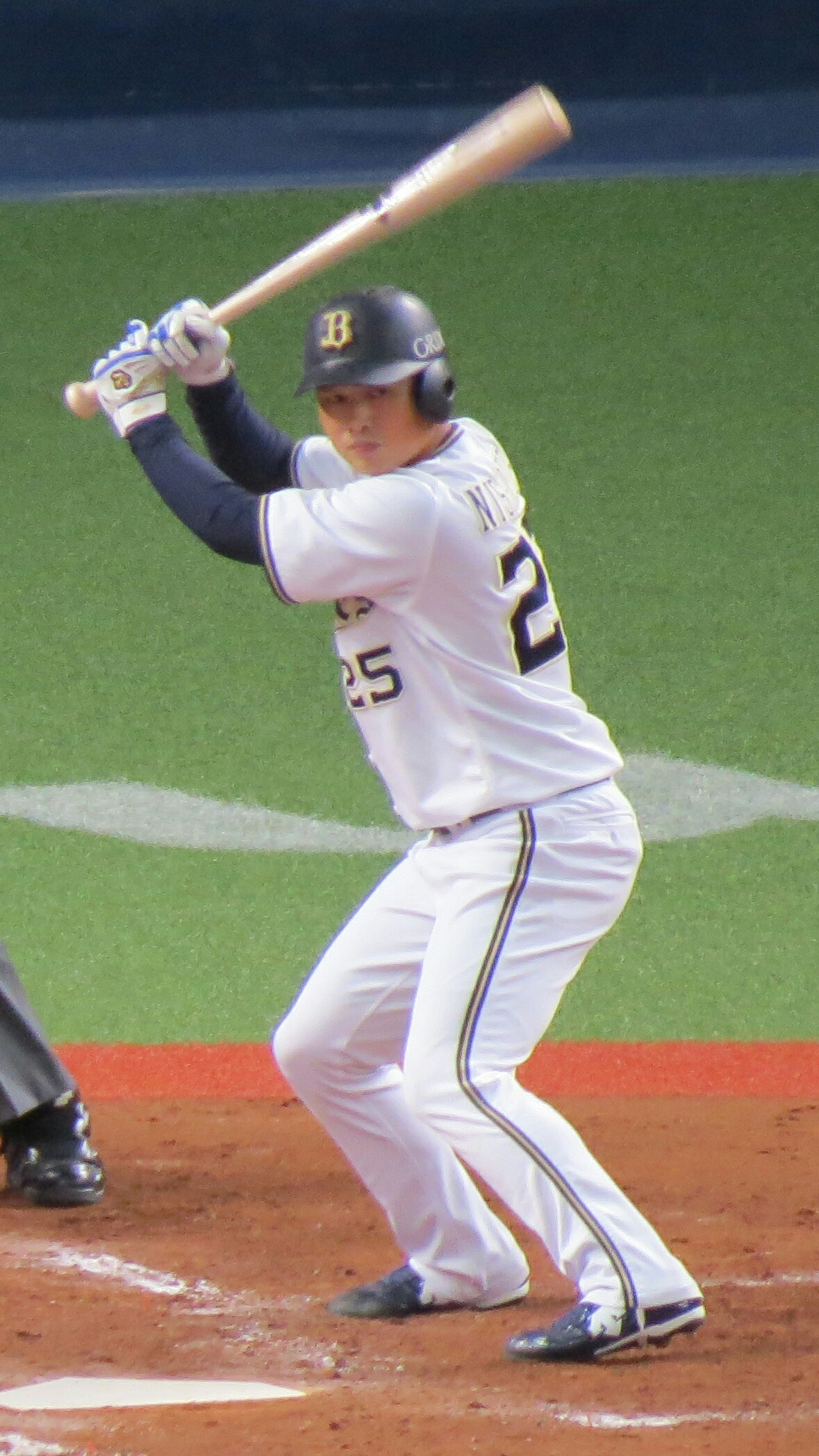 西村凌20190923